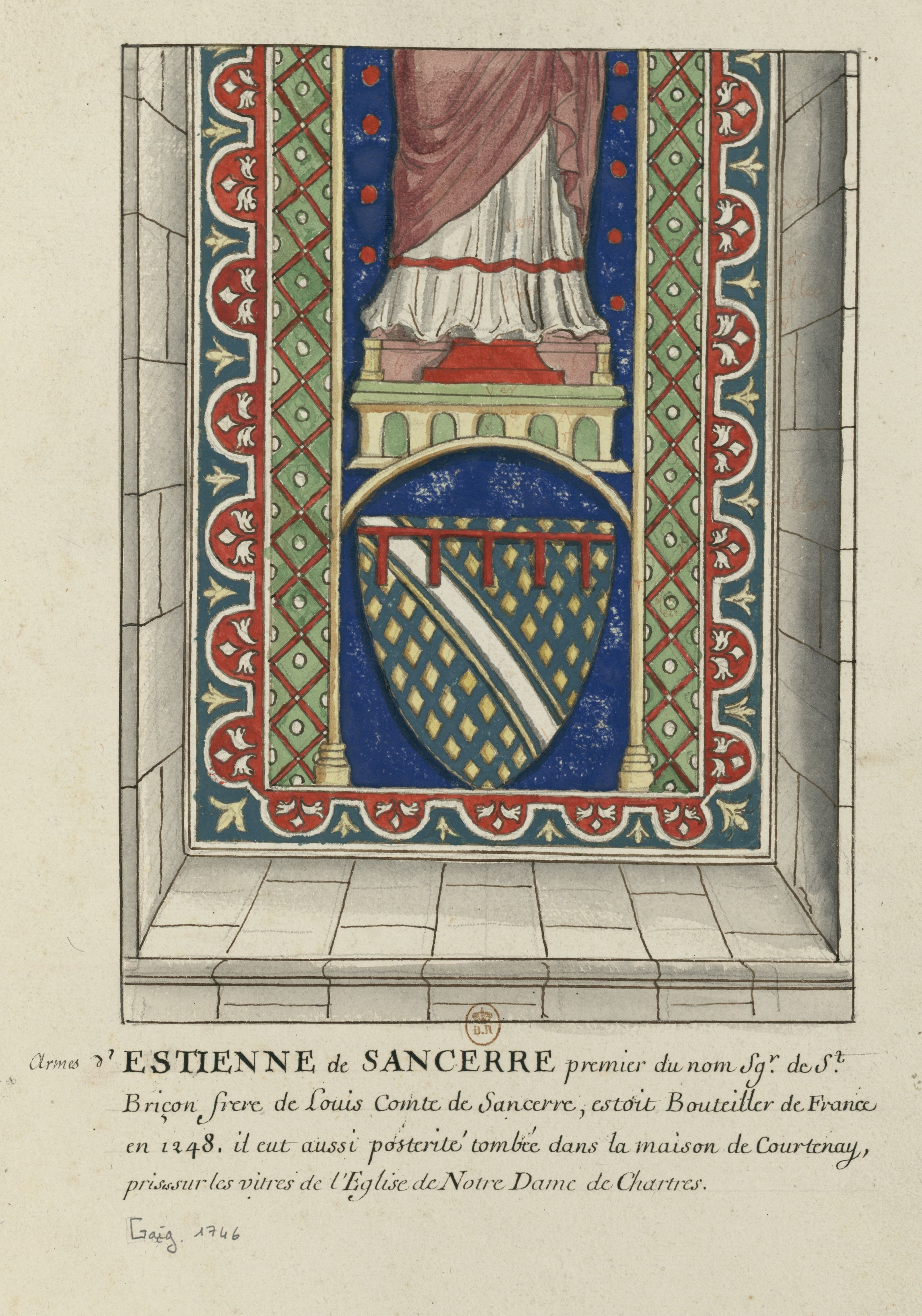 Dessin, Vitrail de N.-D. de Chartres sur lequel sont peintes des armoiries, d'azur semé de losanges, d'or à la bande d'argent accompagnée de deux cottices d'or au lambel de gueules à cinq pendants sur le tout